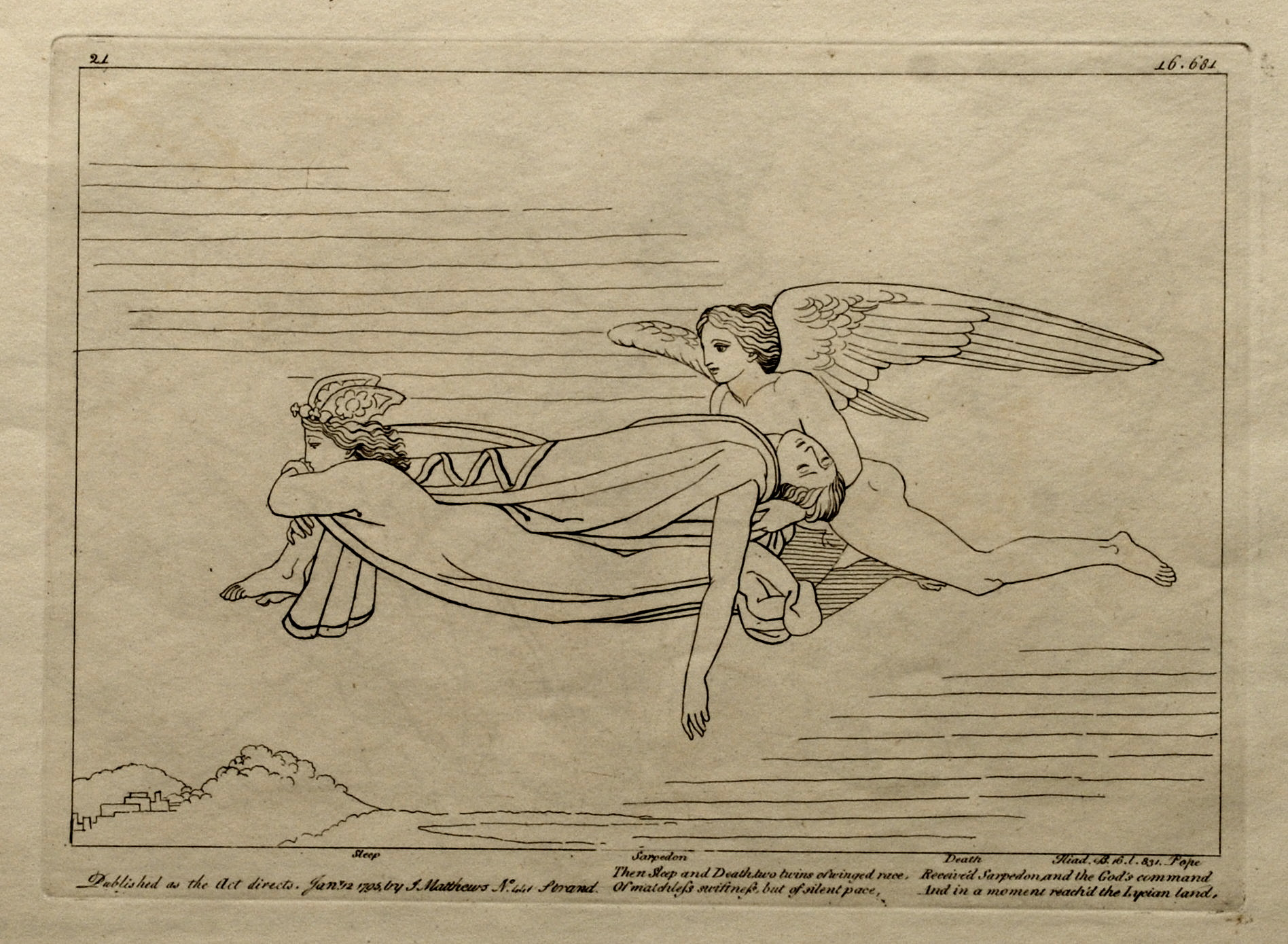 Kupferstich (1795) von Tommaso Piroli (1752 – 1824) nach einer Zeichnung (1793) von John Flaxman (1755 – 1826).